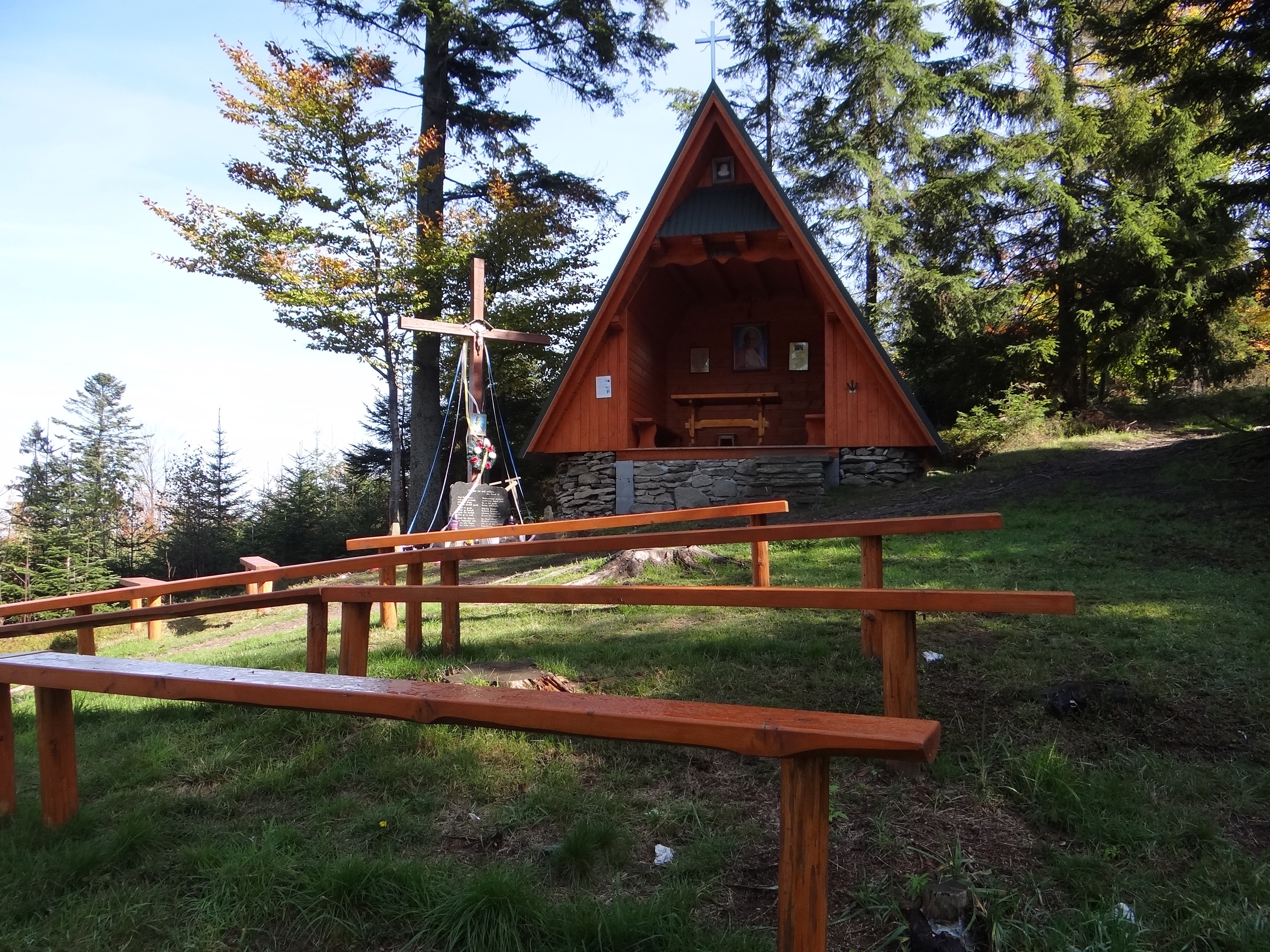 Kaplica na Żeleźnicy